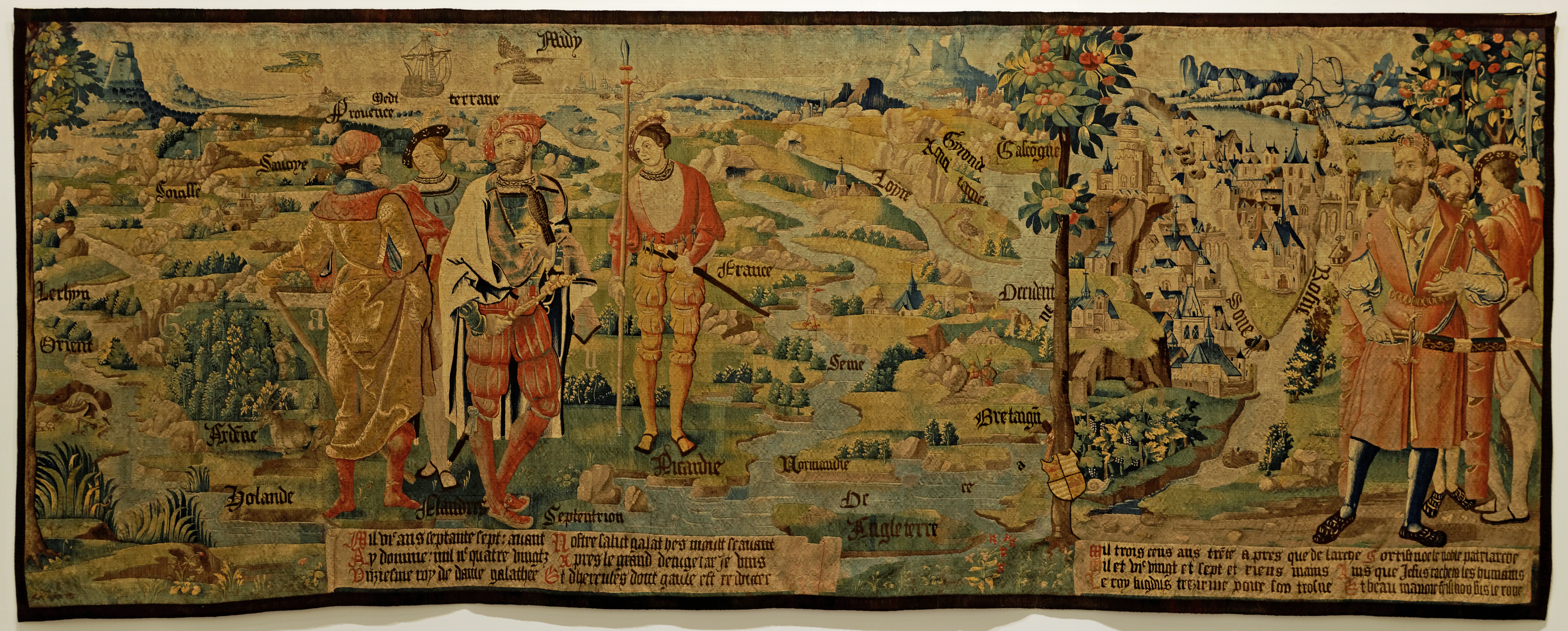 Manufacture d’Arras (?), Galathès, fils d’Hercule, 11e roi des Gaules, et Lugdus, fondateur de Lyon , musée de l'Oise.